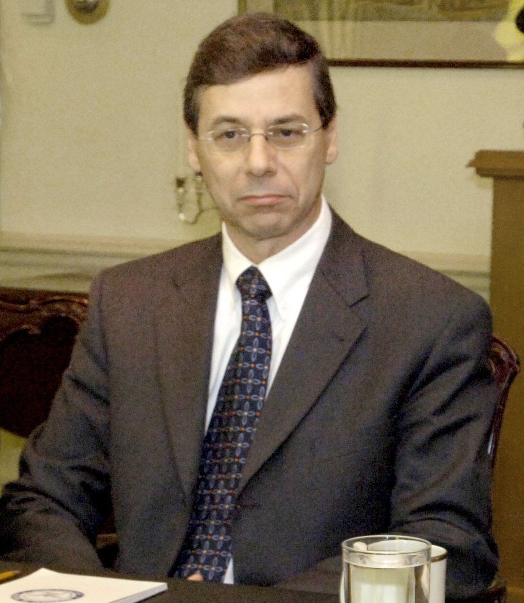 Daniel Ayalon